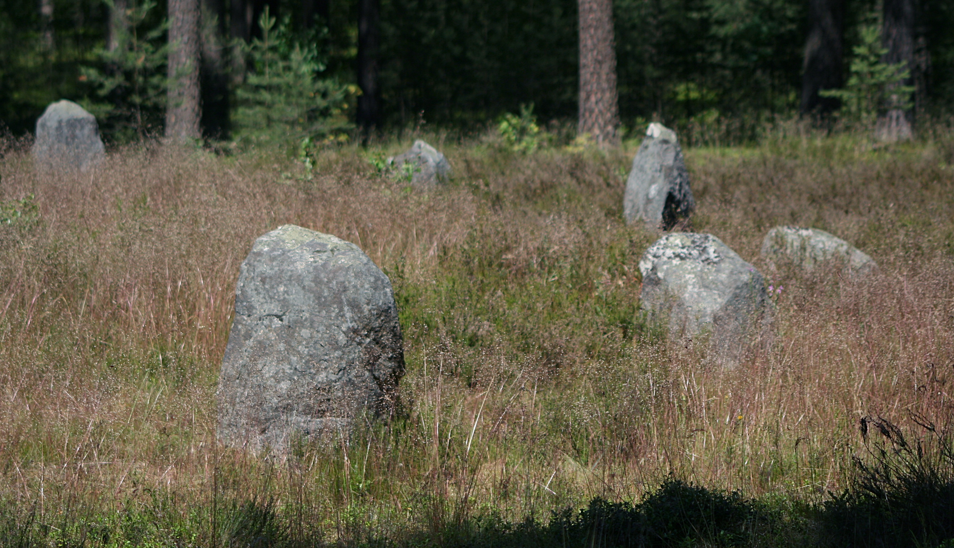 Fragment kręgu IV na cmentarzysku Gotów w Odrach, gmina Czersk